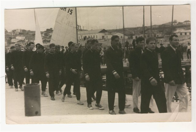 На открытии соревнований на водно-спортивной станции "Нептун,в первом ряду Шелковников и Юрий Шаврин, в середине снимка молодой Валерий Николин